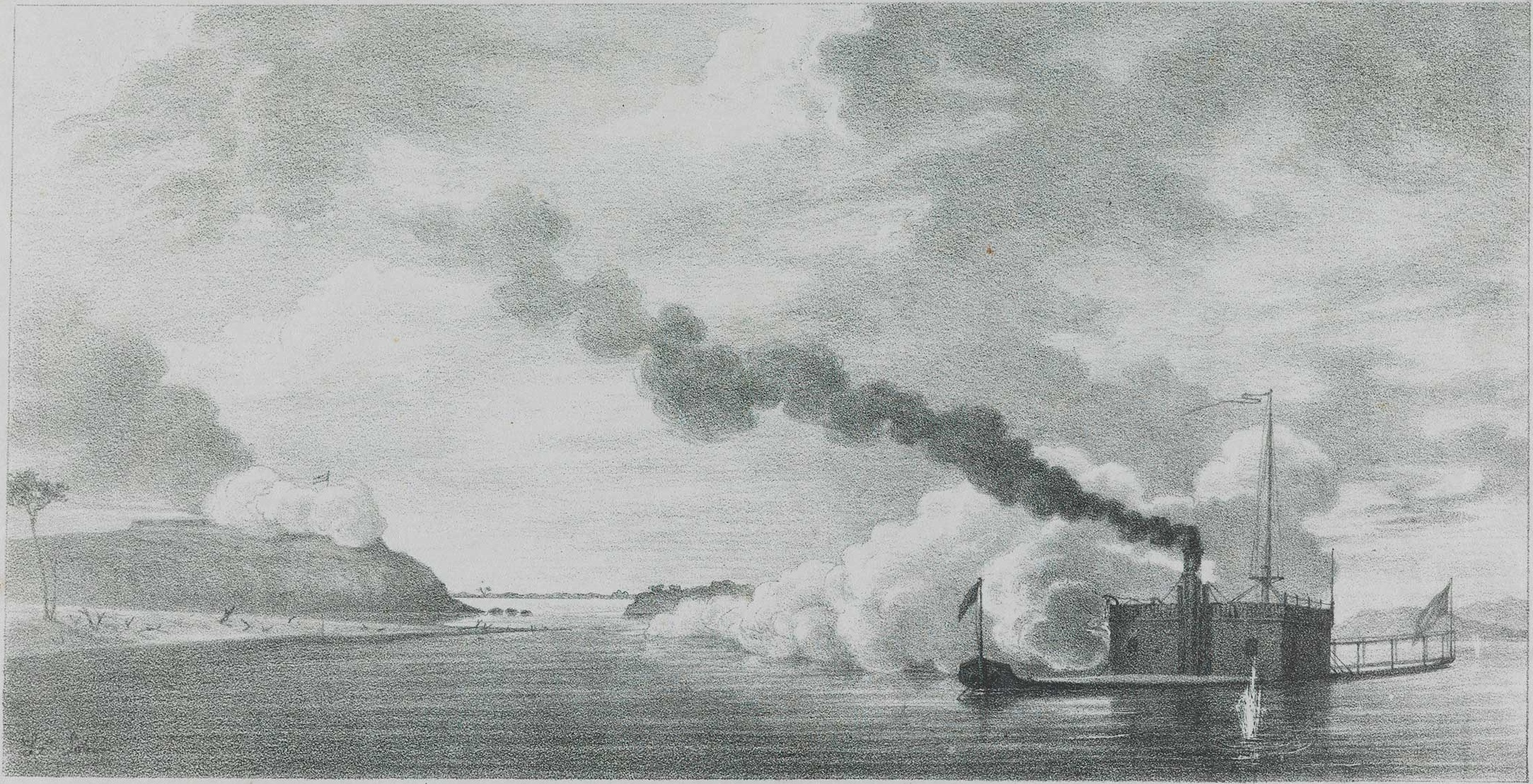 Bombardeio de Itapirú